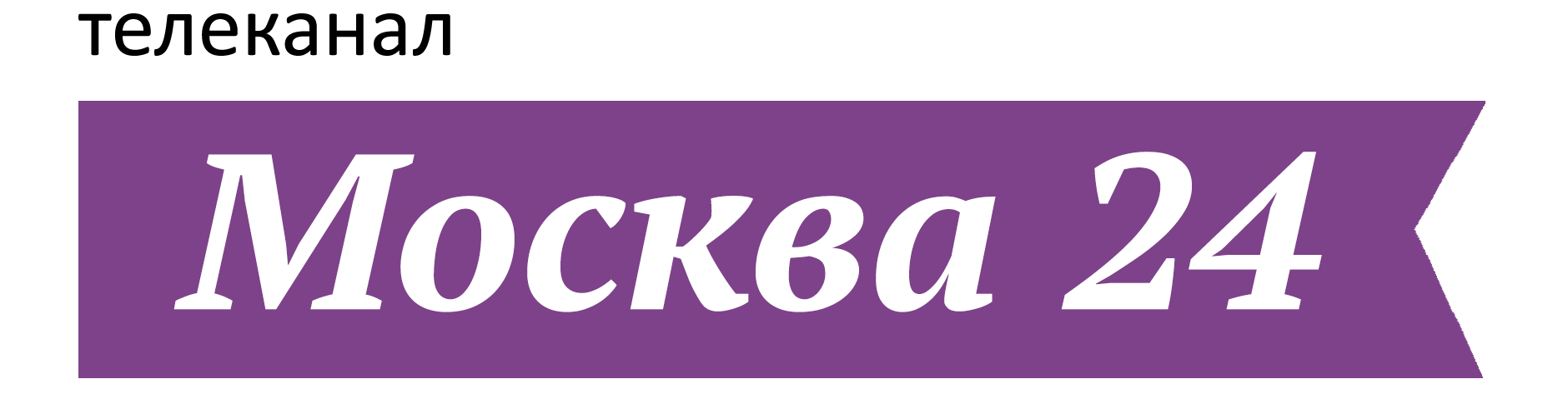 1920х1080